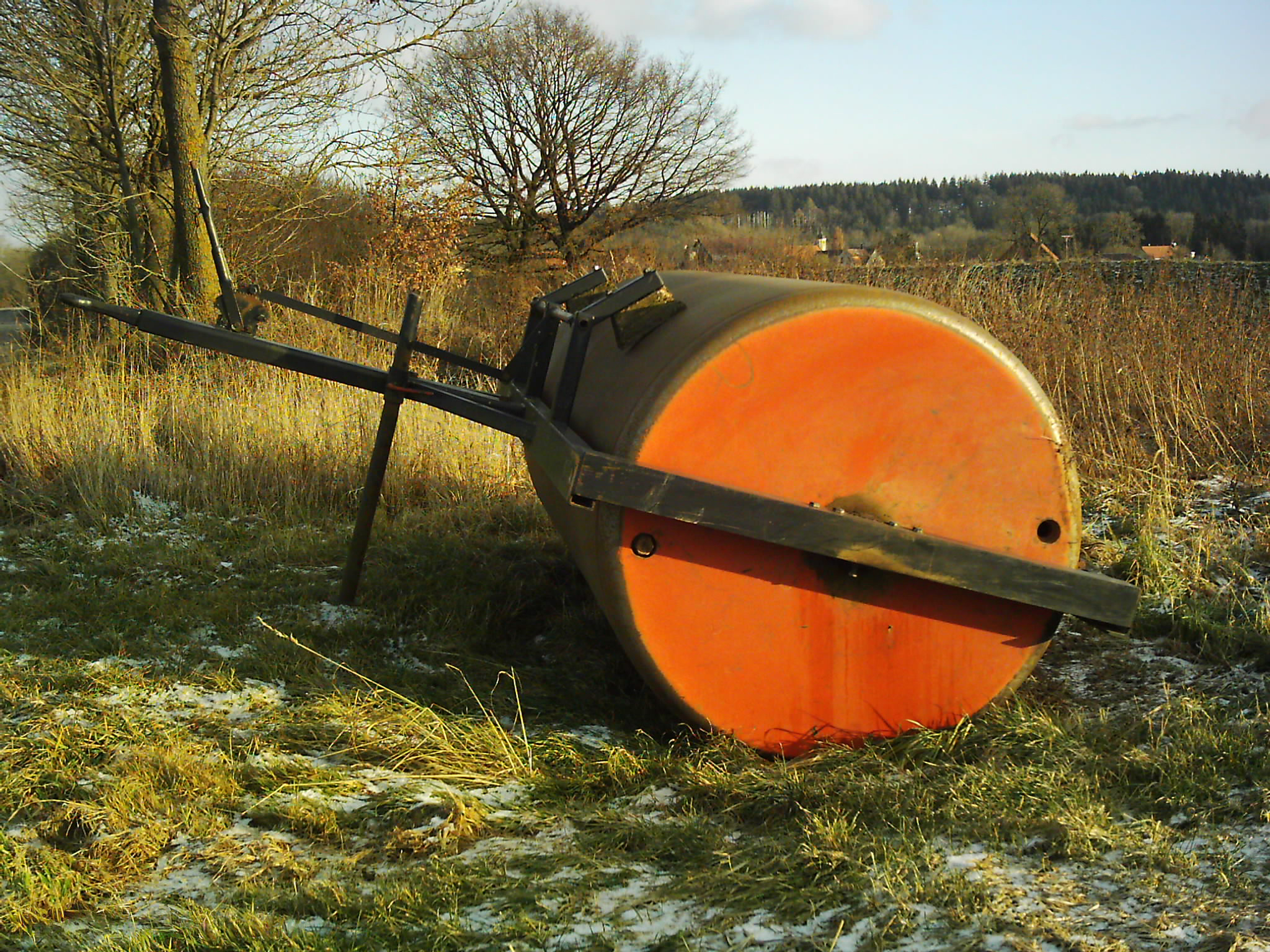 Walze (Landwirtschaft)